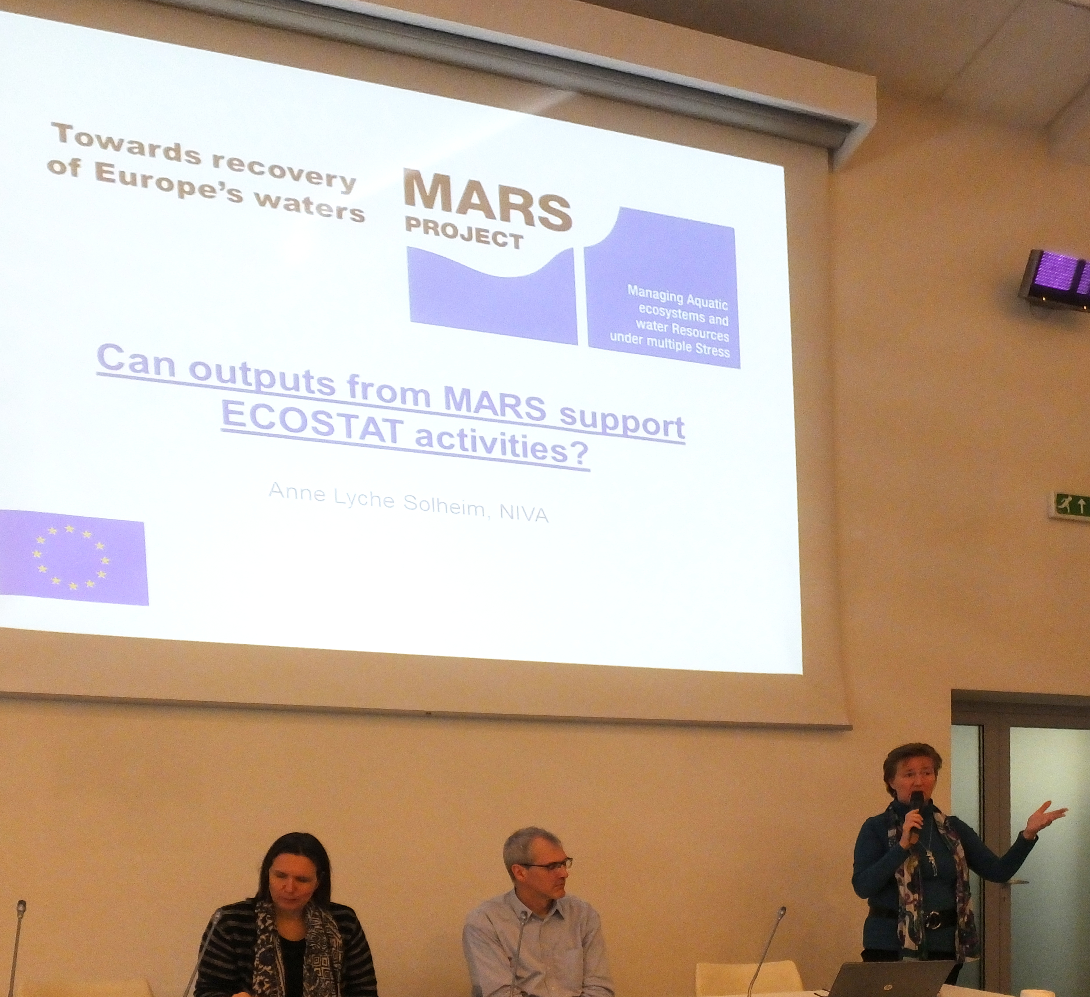 31 spotkanie grupy roboczej Ecostat 16-17 marca 2016 w Warszawie. Sandra Poikane i Wouter van de Bund – Joint Research Centre oraz Anne Lyche Solheim NIVA i EAŚ